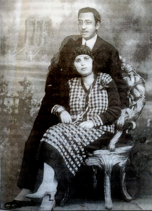 İstiqlal şairi Əmin Abid Gültəkin və xanımı Nafiə xanım.